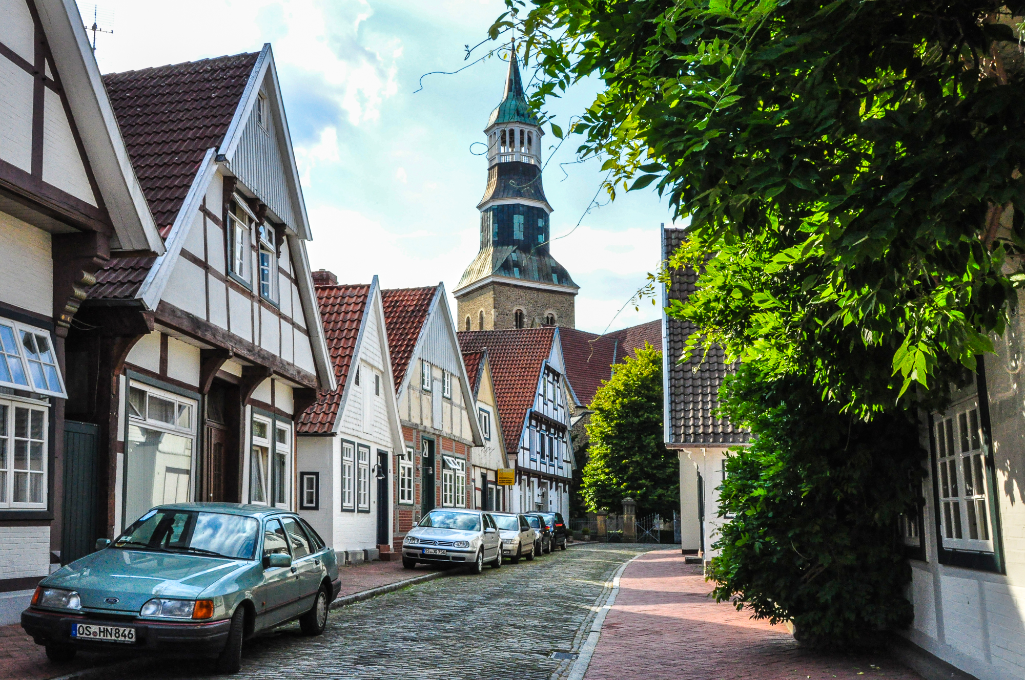 die Große Kirchstraße ist eine Sackgasse, die an der Kirche endet. Eingeschossige Häuschen bilden einen abwechslungsreichen Straßenraum, sie lassen die Kirche um so höher erscheinen.